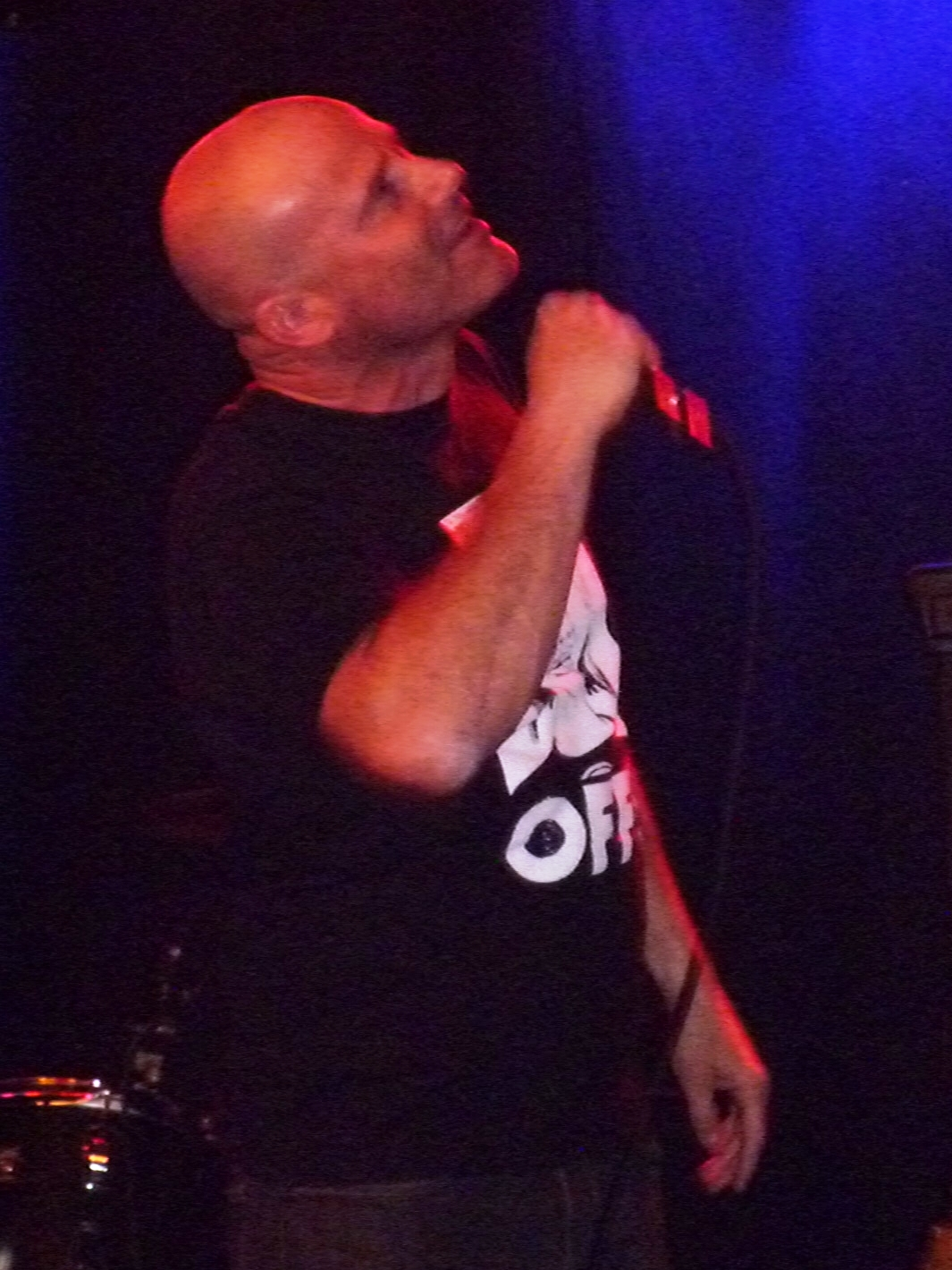 Peter Stahl von Scream live im Kleinen Klub (Saarbrücken)